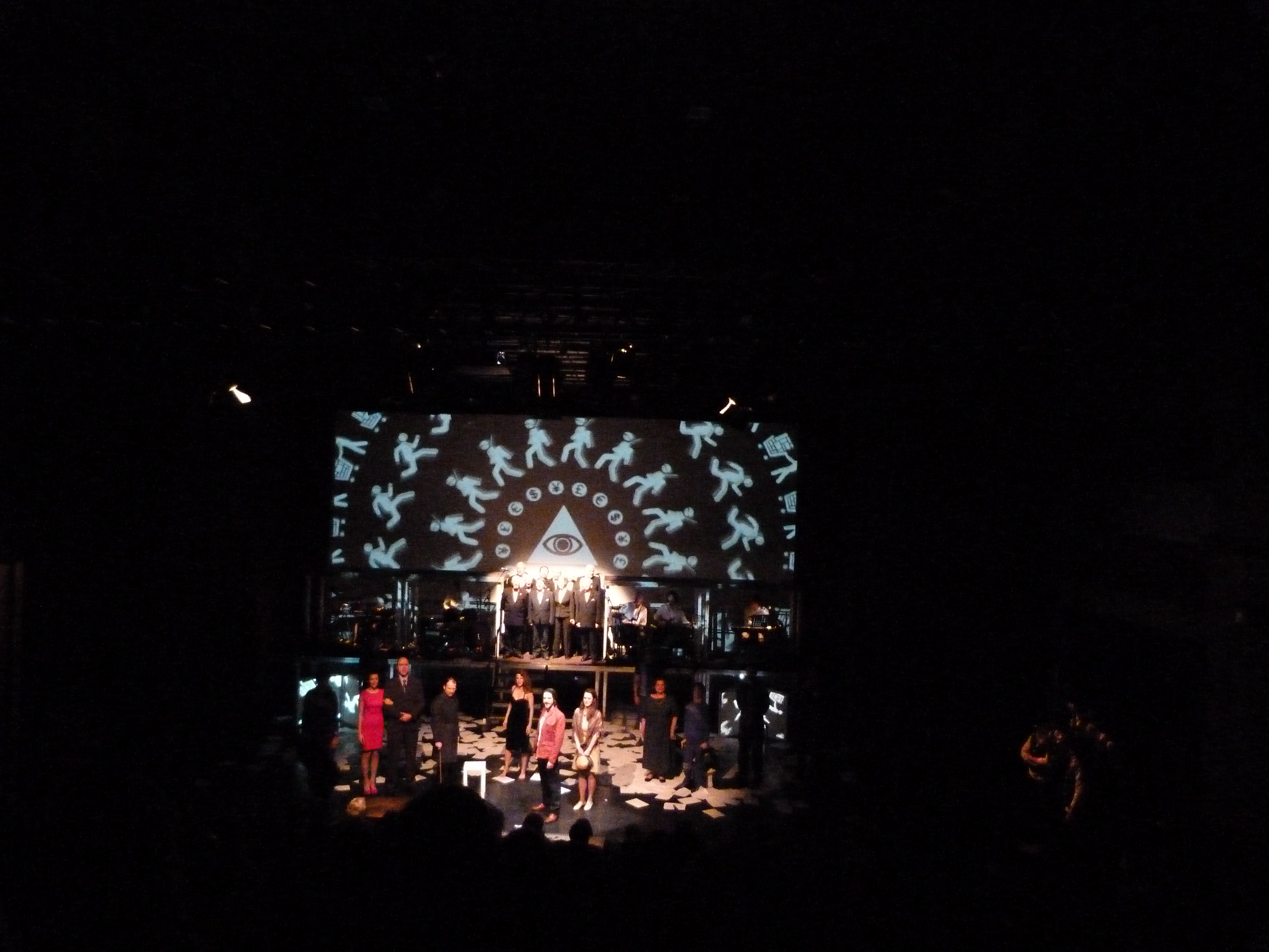 A felvételek 2013. Február 5 –én készültek Budapesten, a TRAFÓ Kortárs Művészetek Házában. Premier: a TÁP Színház mutatta be Fekete Ádám átiratában Alekszandr Nyikolajevics Osztrovszkij: Jövedelmező állás (Profitable position) című drámáját. Osztrovszkij az orosz kapitalizmus hajnalán, 1857 –ben írta darabját, melyet Fekete Ádám átírt. A TÁP színház változata a baloldali-liberális világértelmezés keretei közé illeszkedik. Rendezte: Vajdai Vilmos, közreműködik: Puszi Együttes, szereplők: Hegedűs D. Géza, Stork Natasa, Thuróczy Szabolcs, Schönberger Ádám, Sebő Ferenc, Ezüst higany, Szabó Simon, Kovács Krisztián, Gera Marina, Gergely Katalin, Lázár Kati, Mózes Balázs. Díszlet: Kálmán Eszter, jelmez: Juhász Dóra, vágó: Gábor Márton, Juhász András, dramaturg: Keszthelyi Kinga, ÁT-BELEíró: Fekete Ádám, rendező: Vajdai Vilmos. Az előadás előtt, az előtérben (1), az előadás záró jelenete (2), plakát (3). ©© Megjelent Creative Commons alatt a Metapolisz sorozatban. A Metapolisz sorozat valamennyi képe és filmje Creative Commons alatti valamint kereskedelmi - for profit - célra is felhasználható. Ajánlott hivatkozás: Derzsi Elekes Andor: Metapolisz DVD line ©© Published under Creative Commons in the Metapolisz DVD line. All of the photos and vids in the Metapolisz DVD line are under Creative Commons and can be used even for commercial – for profit – purposes. Recommended Citation Derzsi Elekes Andor: Metapolisz DVD line